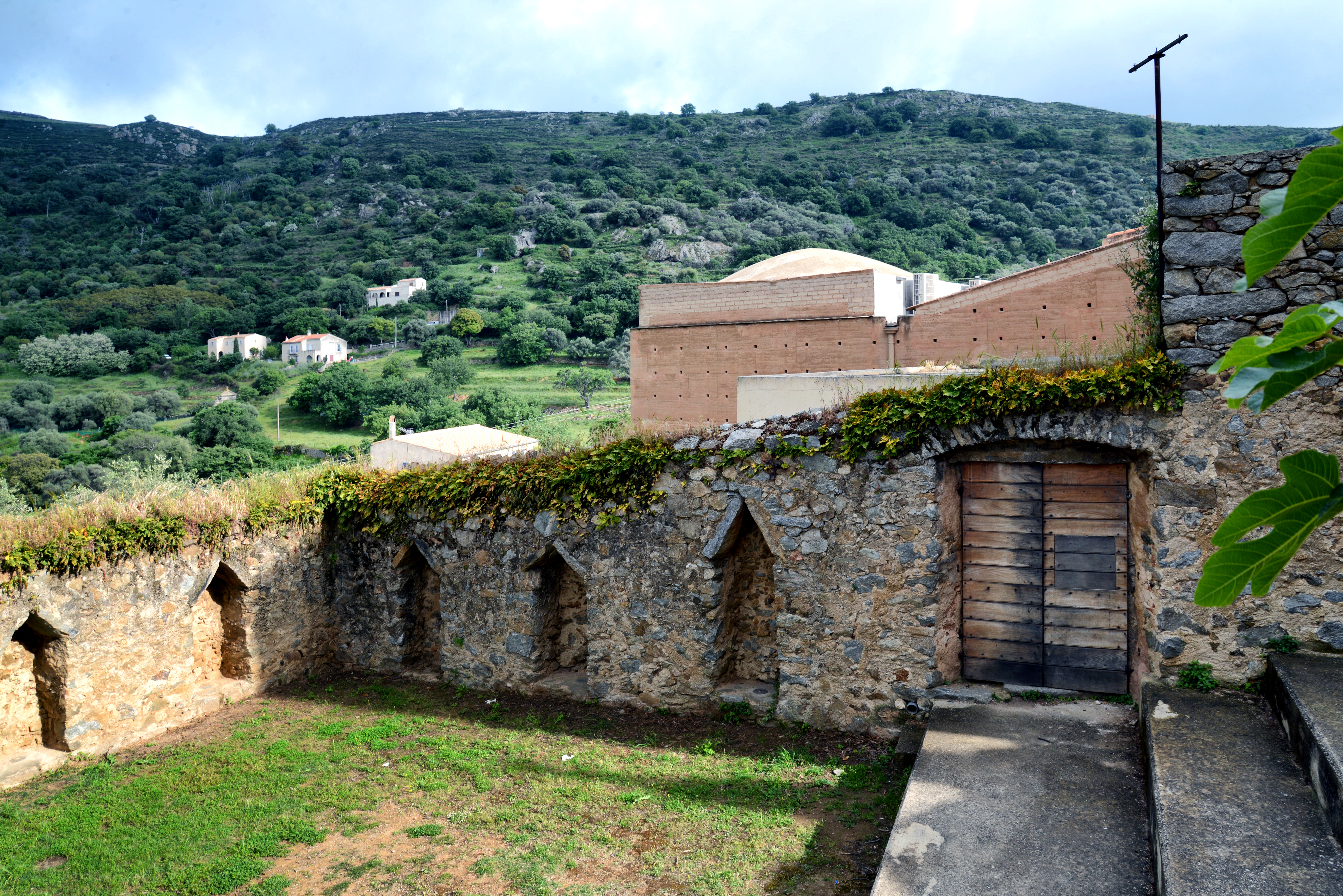 Pigna, Balagne (Corse) - Enclos A Vaccaghja : l'un des derniers témoignages de l'intense activité céréalière de la Balagne. Il a été transformé en un amphithéâtre de 220 places pour des spectacles en période estivale